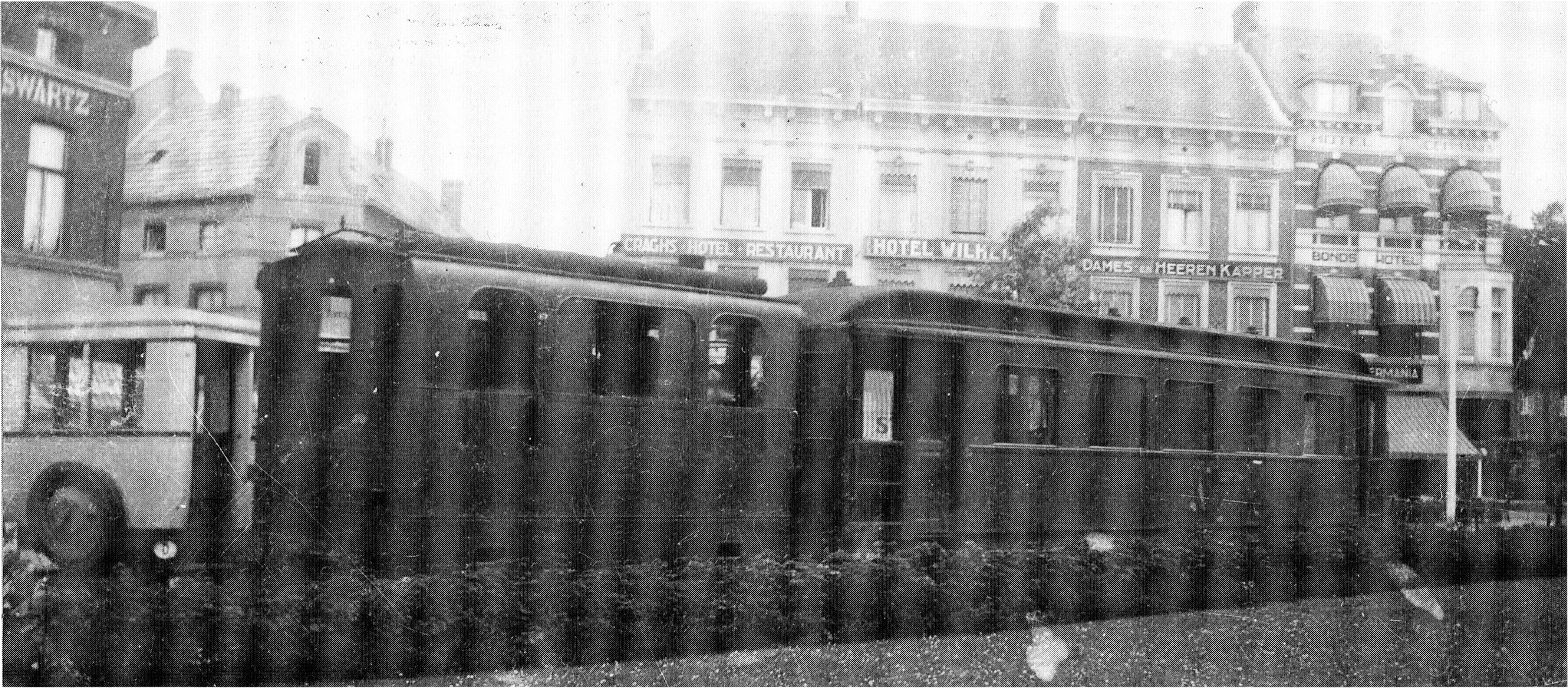 Smalspoorlocomotief CLS (Centrale Limburgsche Spoorwegmaatschappij) 2 met wagon op het Stationsplein in Roermond. Foto. Afmetingen onbekend. Privéverzameling Ing. W.D.J. Cramer.